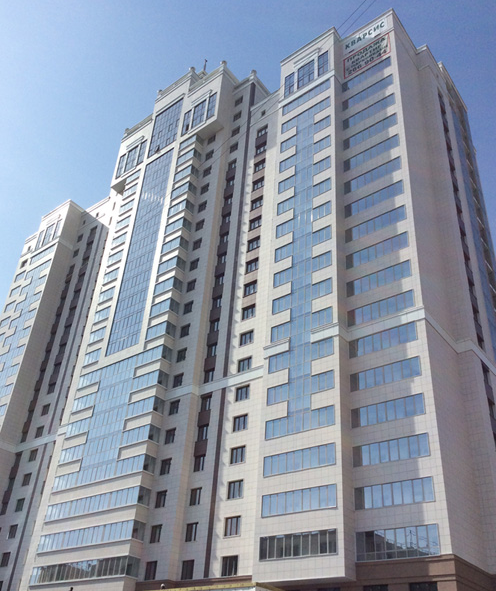 Жилой комплекс "Кварсис"